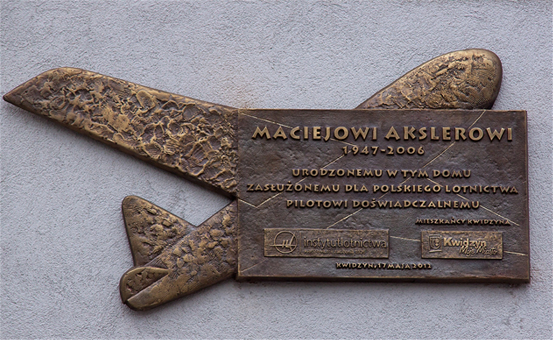 Tablica pamięci polskiego pilota doświadczalnego mgr. inż. Macieja Akslera na domu, w którym urodził się w Kwidzynie, odsłonięta 30 maja 2012 roku.